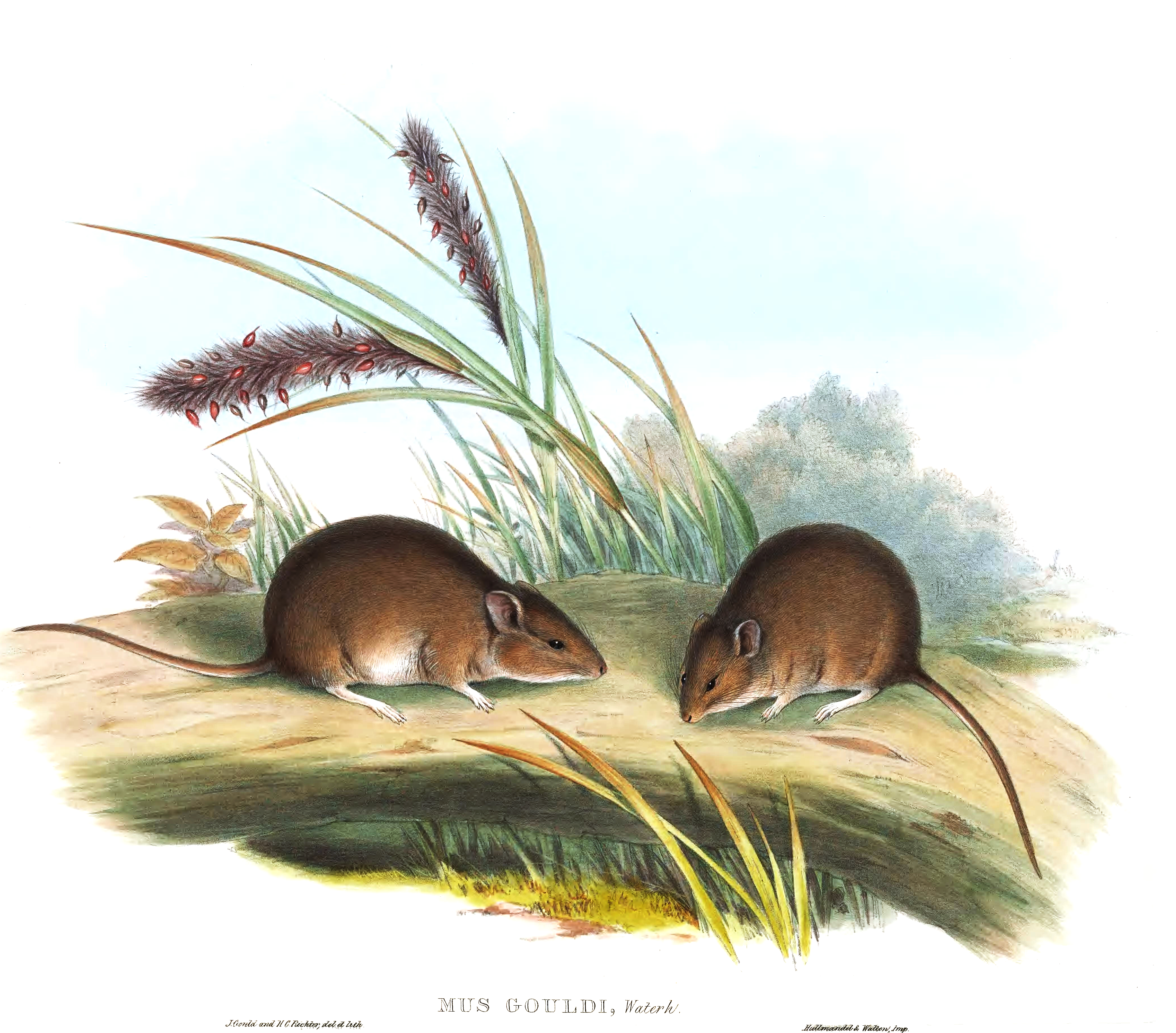 Pseudomys gouldii (orig. Mus gouldii)